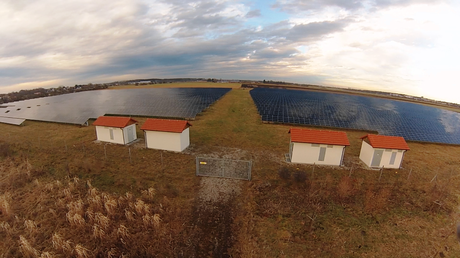 Solarpark Wiedergeltingen